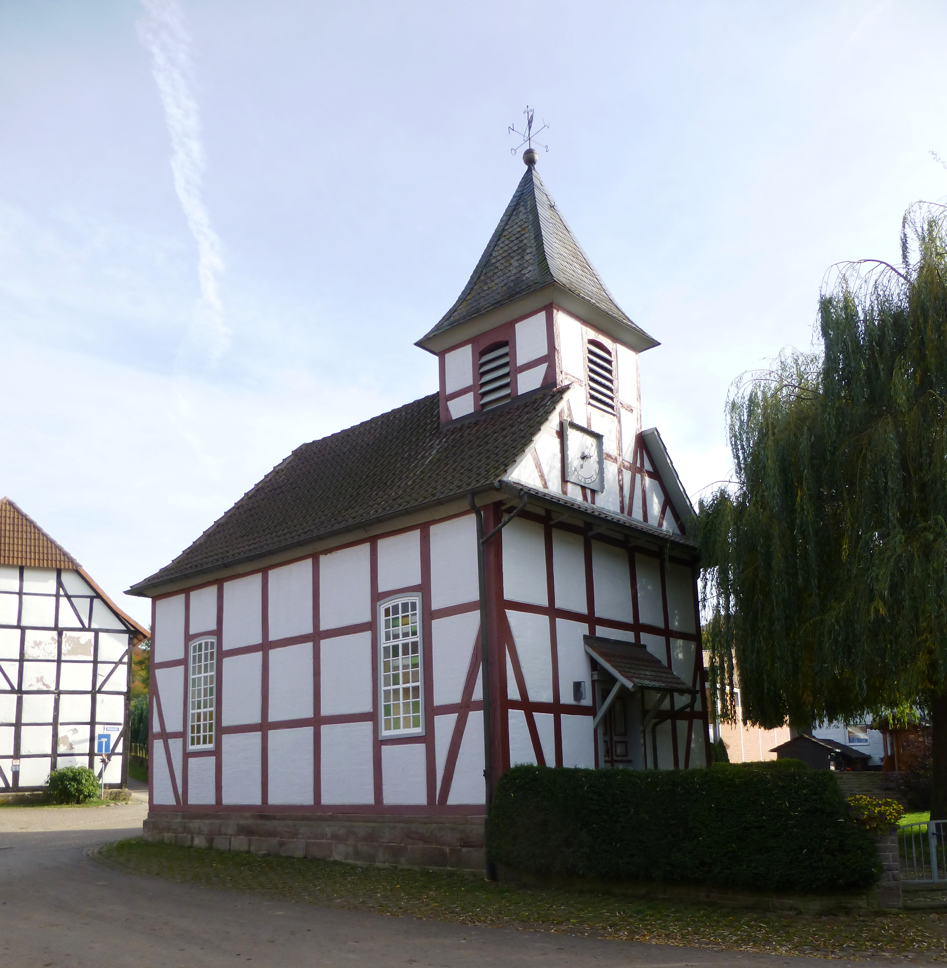 Ev. Kirche in Albshausen, Stadt Witzenhausen, Nordhessen